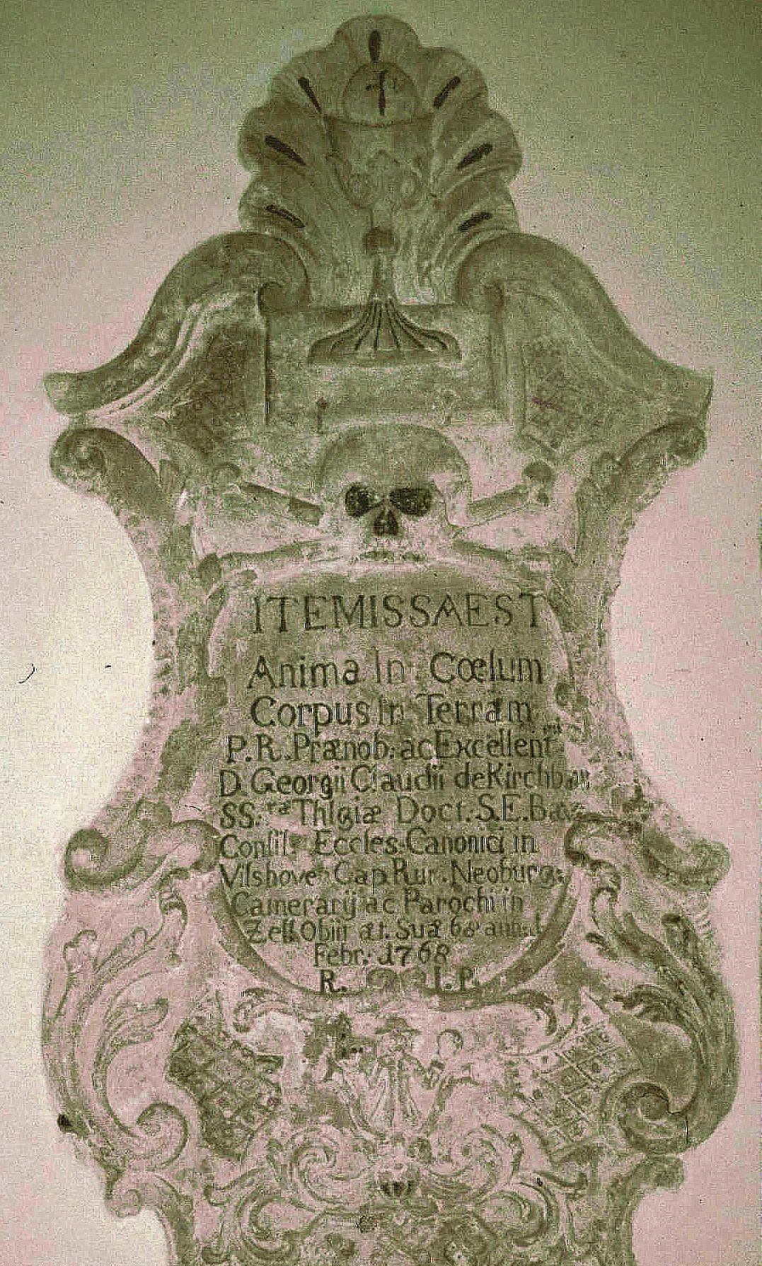 Der Gedenkstein an den Kircchenerbauer Dr. Cclaudius Kirchbauer in Zell.